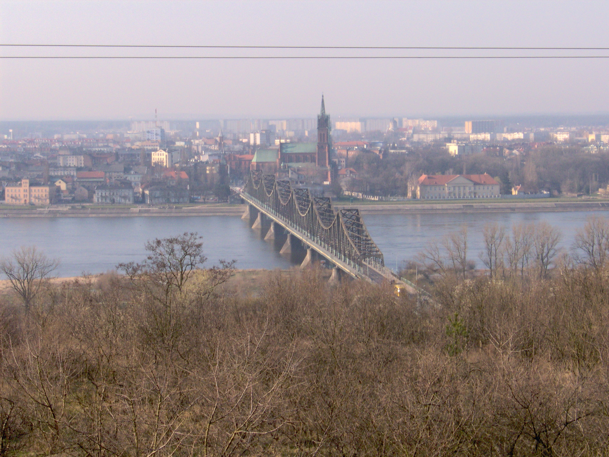 Włocławski most na Wiśle w starym malowaniu (2007 r.)